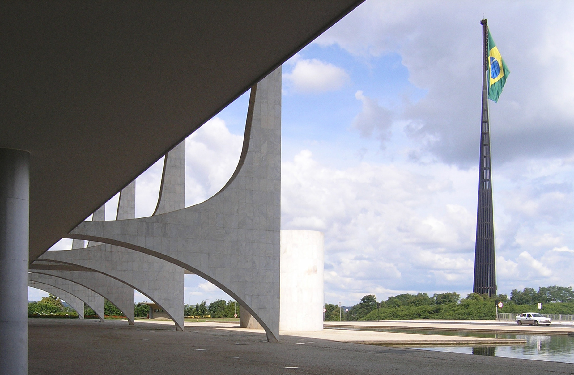 Vista da fachada do Palácio do Planalto e do Pavilhão Nacional do Brasil em Brasília.